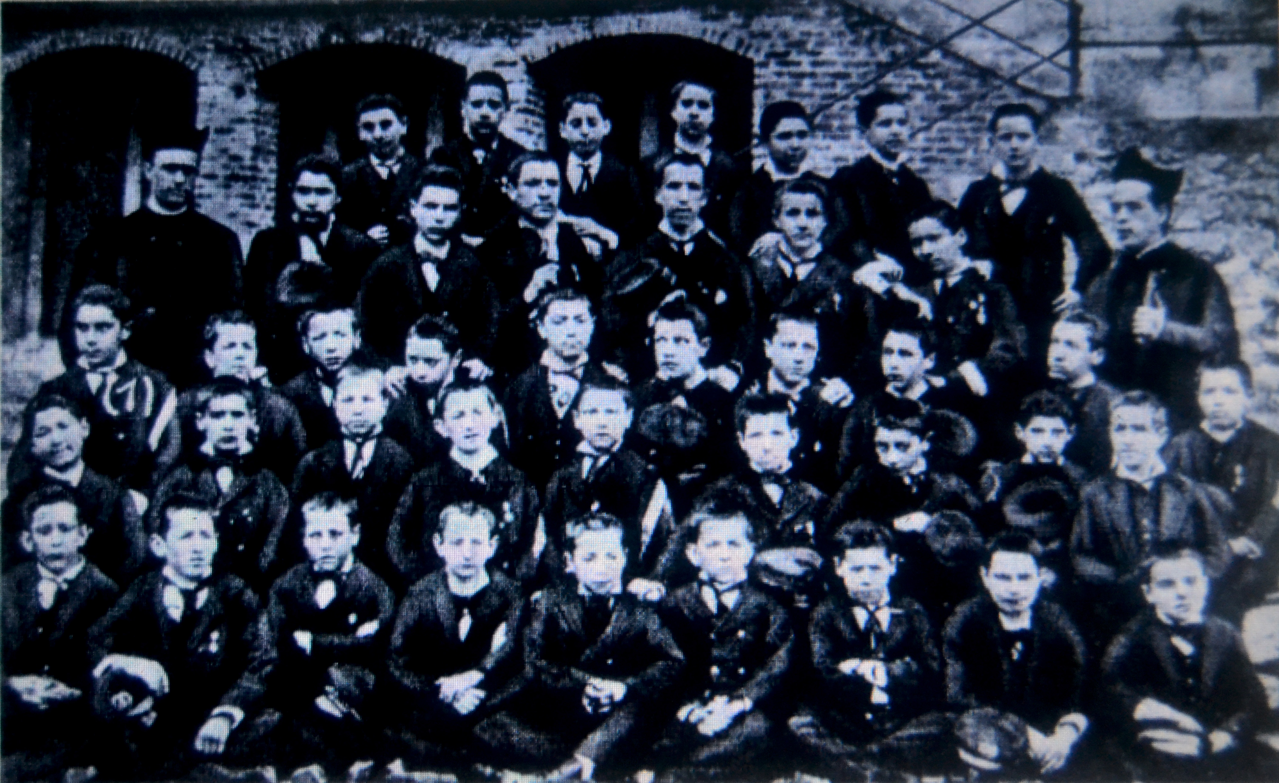 Urduñako jesuiten ikastetxeko 1878-1879 ikasturteko ikasle eta irakasleak. Sabin Arana Goiri (1 zenbakia) agertzen delarik. Bizkaia, Euskal Herria. - College of Jesuits from Orduña, 1878-1879 classroom. Sabino Arana Goiri with number 1. Bizkaia, Basque Country.